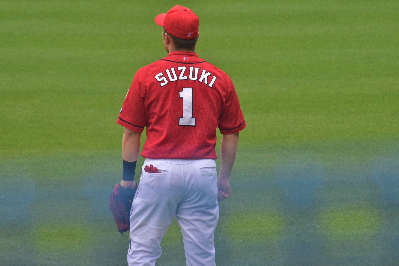 2019年2月24日、宜野湾市営球場にて撮影。